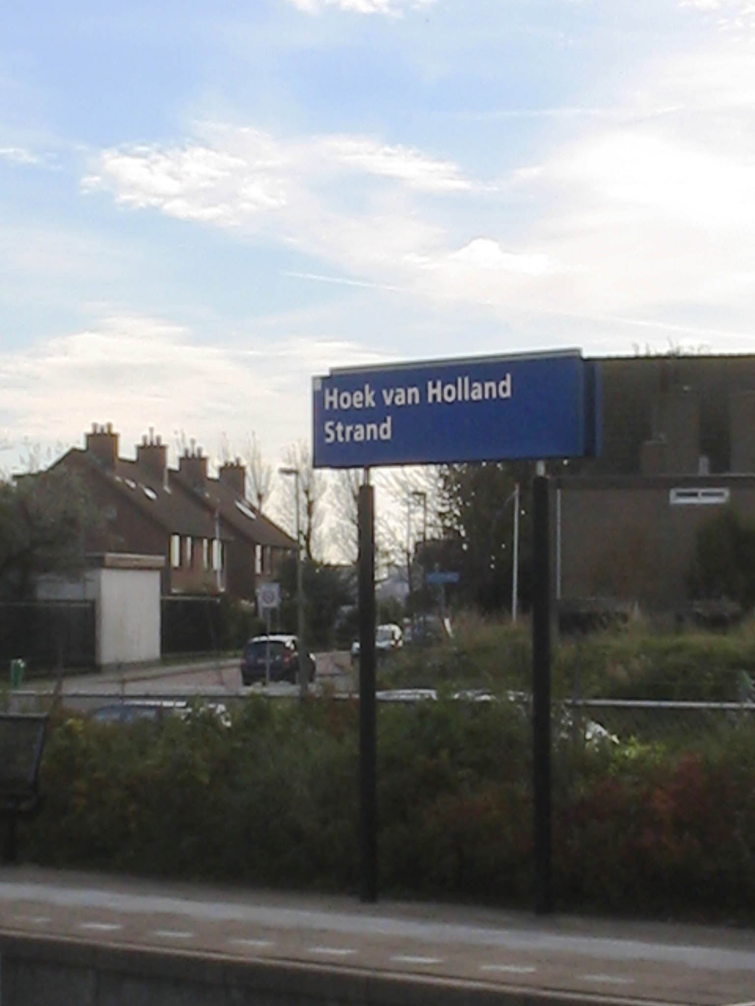 Station Strand Hoek van Holland, 6 november 2005